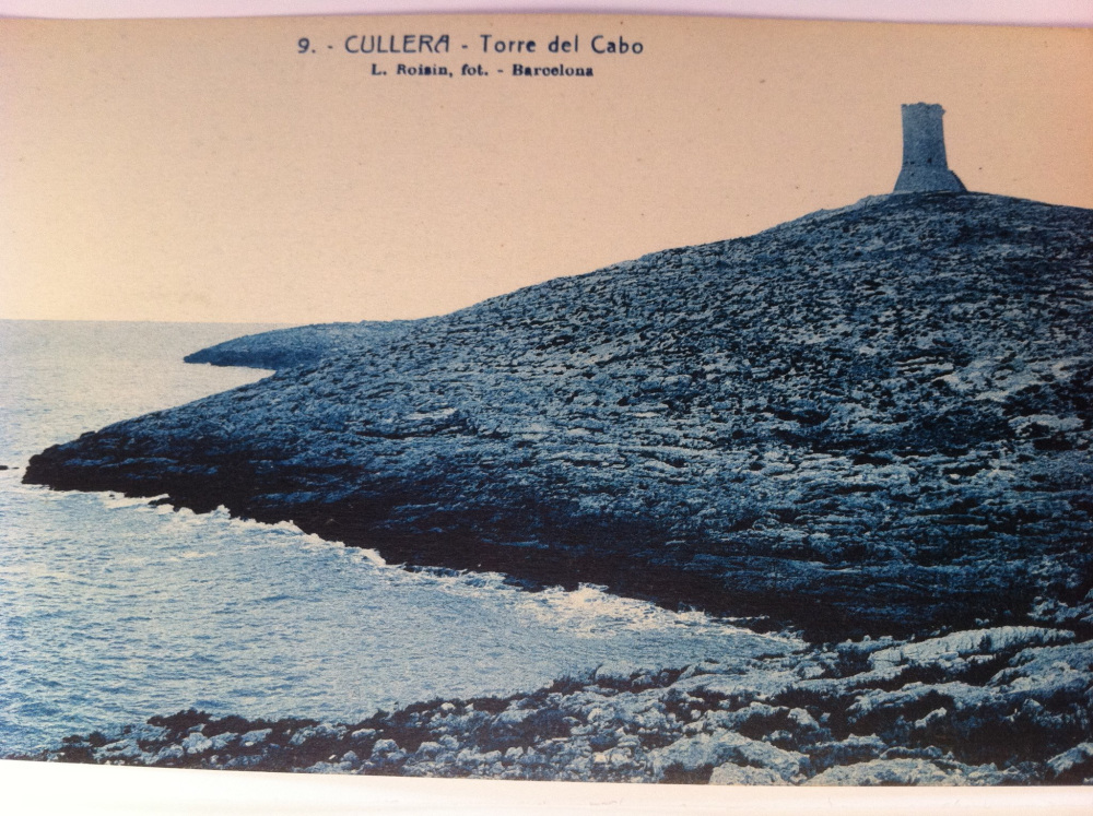 Vistas de los acantilados del actual Faro de Cullera con la antigua torre del cabo actualmente desapaecida